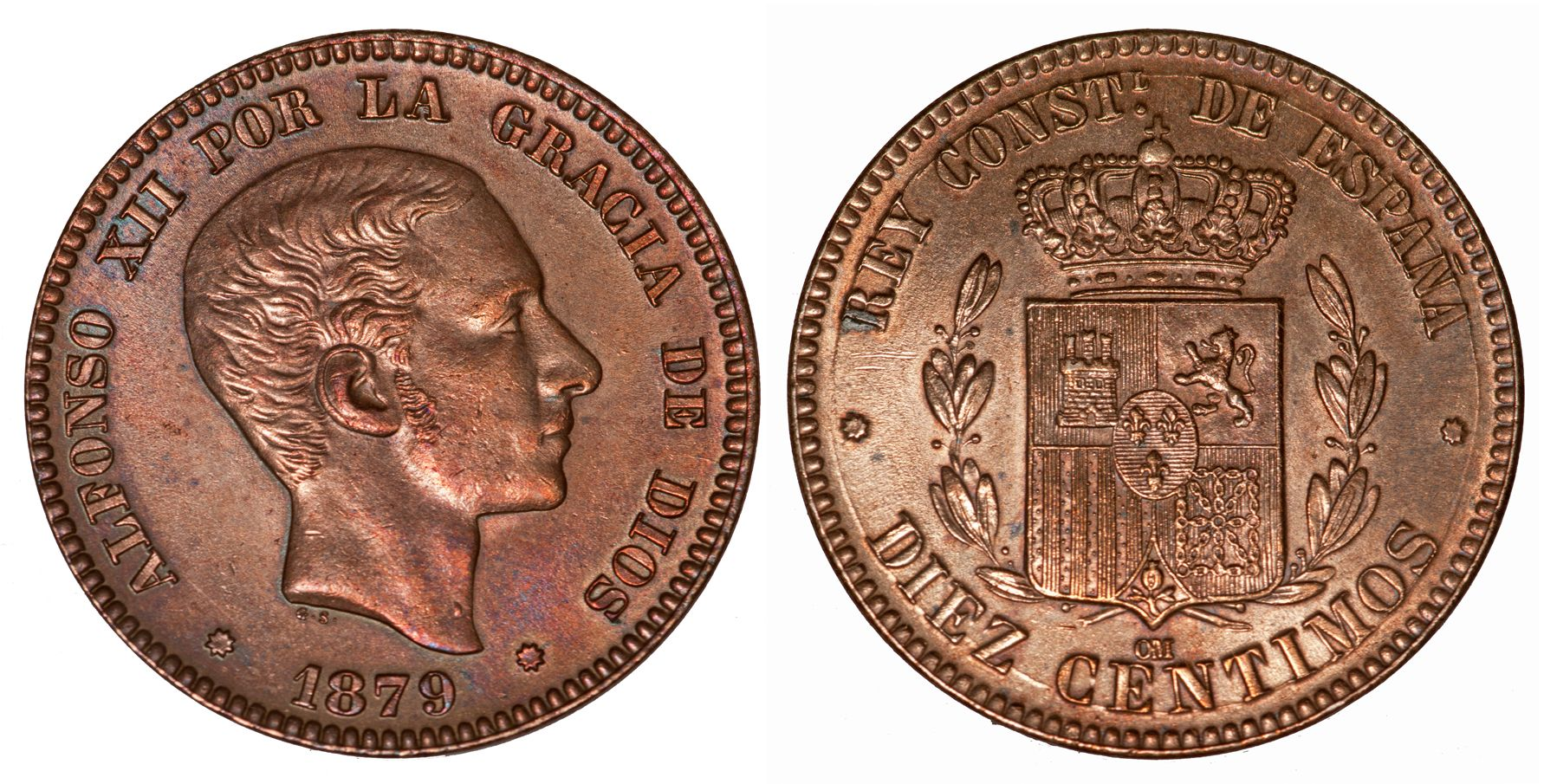 10 Céntimos 1879